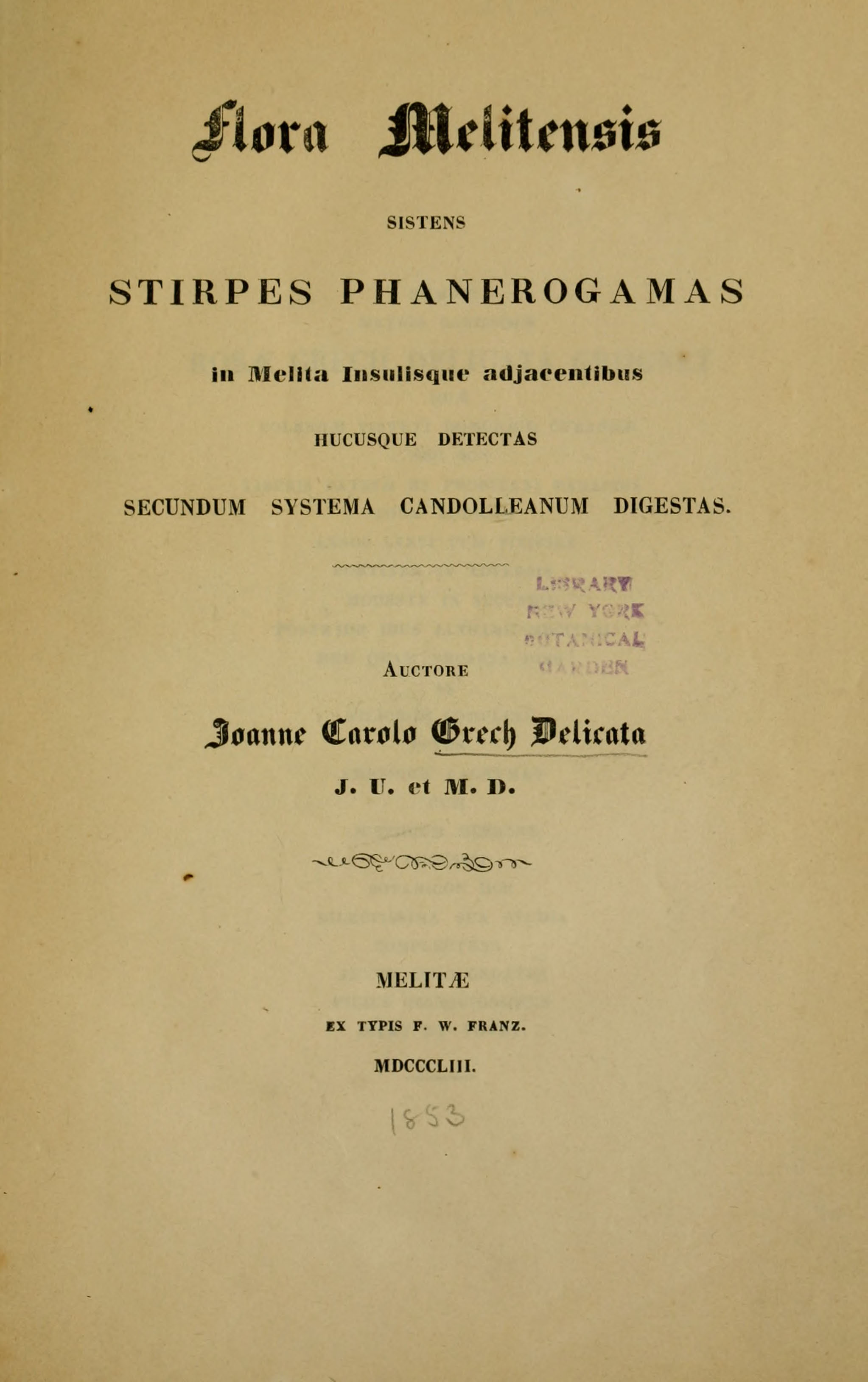 Titelblatt von Giovanni Carlo Grech Delicatas "Flora Melitensis"